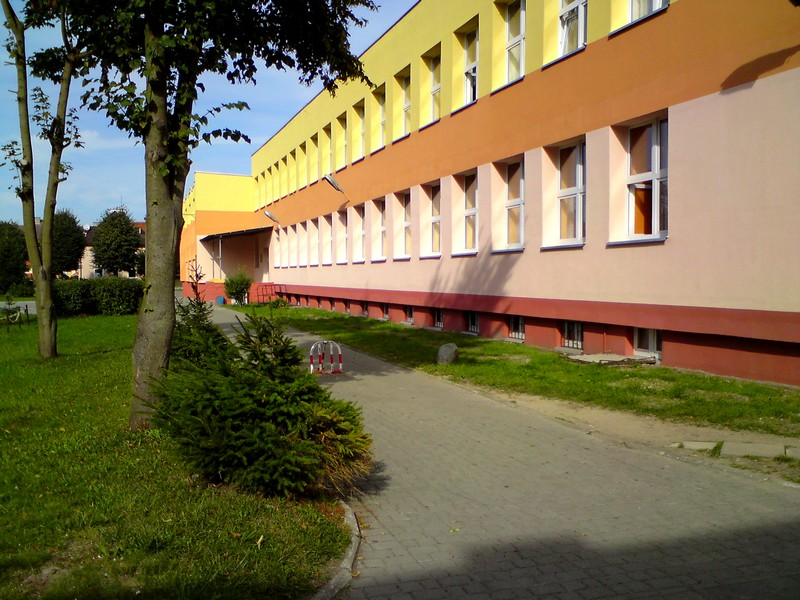 Szkoła Podstawowa nr 3 w Gryficach